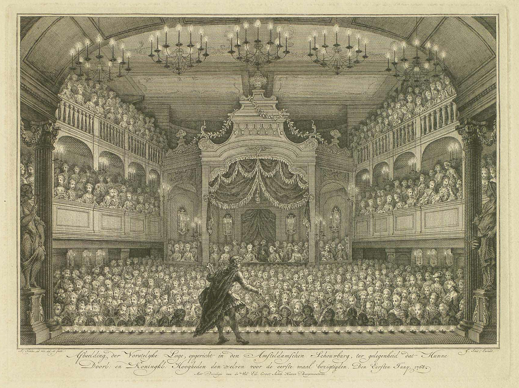 Aftbeelding der vorstelyke Loge, opgericht in den Amsteldamschen Schouwburg, ter gelegenheid dat Hunne Doorl: en Koningkl. Hoogheden den zelven voor de eerste maal bezigtigden. Den Eersten Juny, 1768.